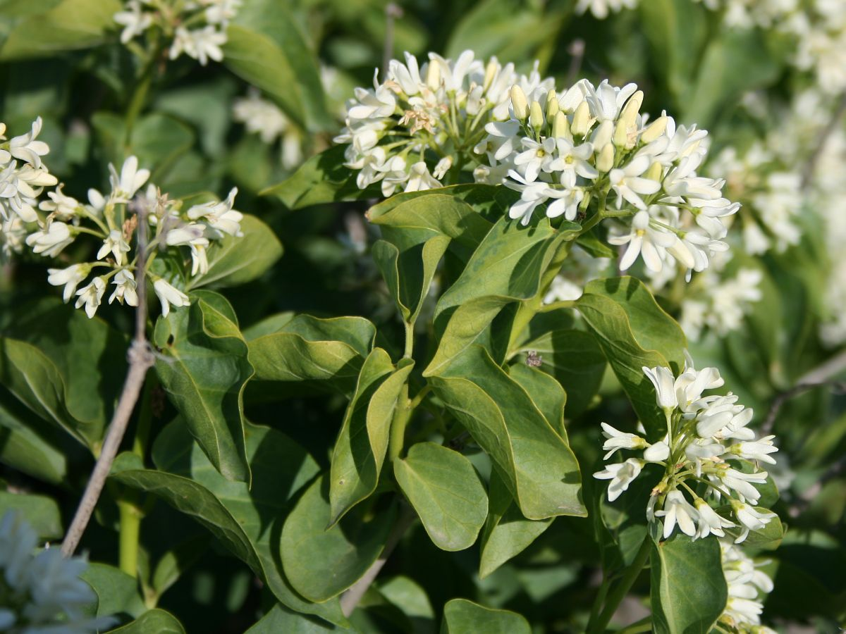 Cionura erecta, Hundsgiftgewächse (Apocynaceae), Seidenpflanzengewächse (Asclepiadoideae) - Türkei/Türkiye/Turkey: Sakarya Prov./Sakarya ili, Sandküste des Schwarzen Meers (Karadeniz) bei Kocaali E Karasu